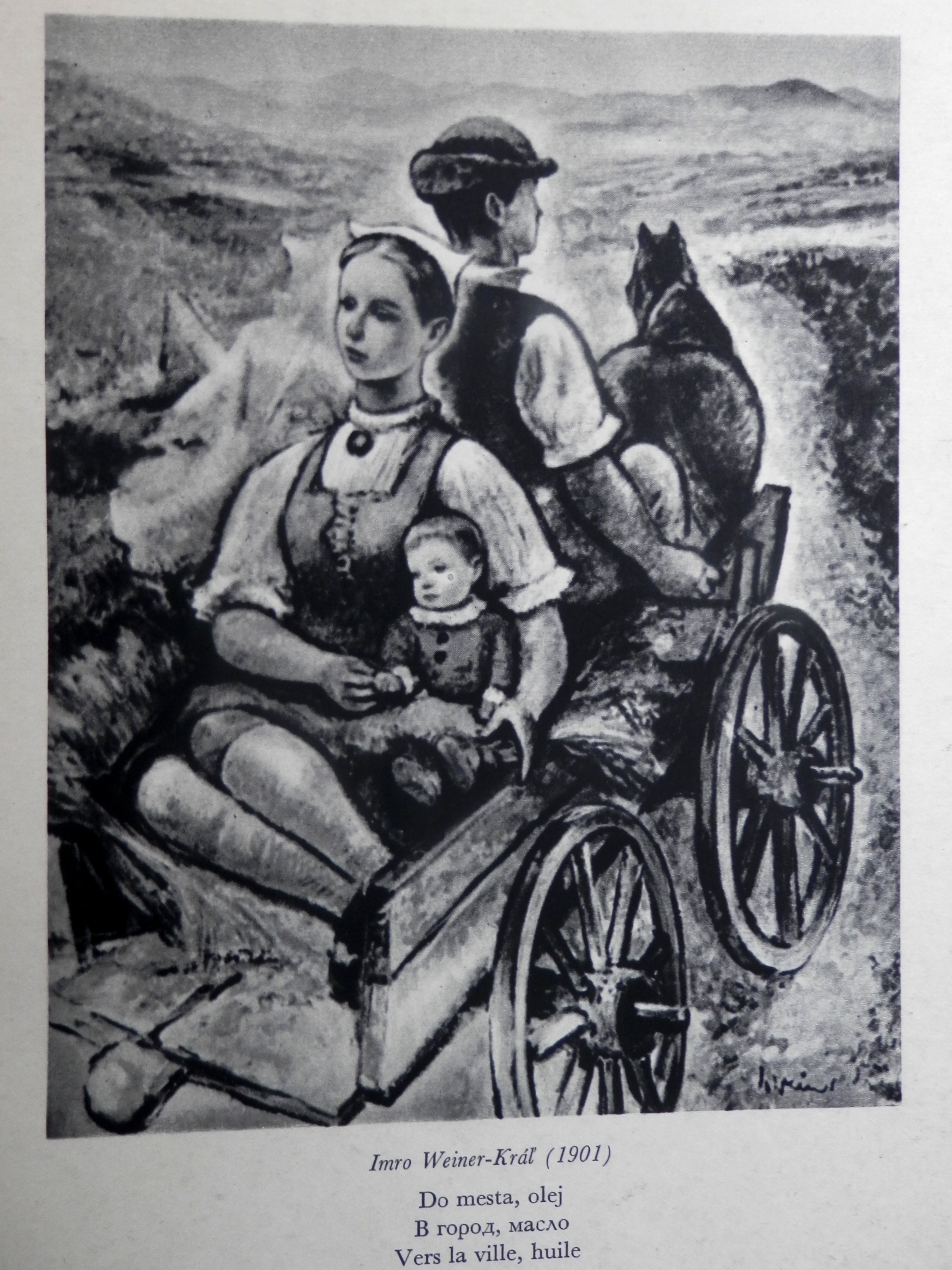 Slovenské výtvarné umenie v dobovej tlači 1947. Digitalizácia obrázku – Do mesta. Autor výtvarného diela: Imro Weiner - Kráľ. Slovensko.